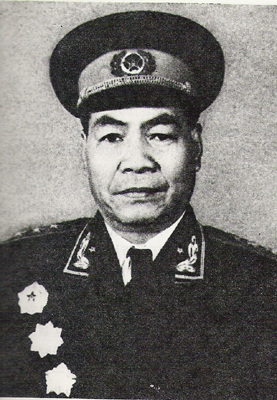 张宗逊授衔照。